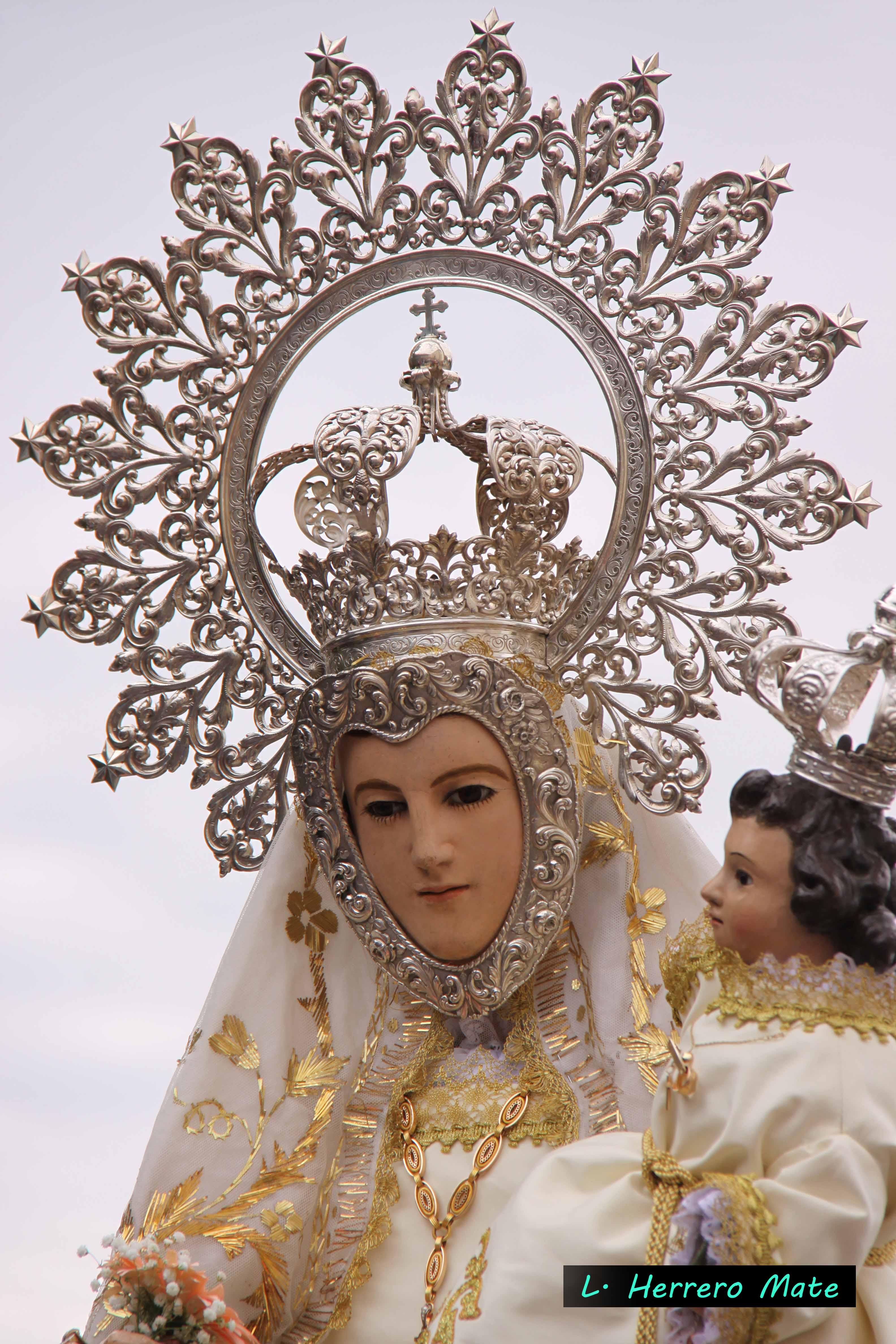 Imagen de Nuestra Señora de Hontanares (Riaza, Segovia)